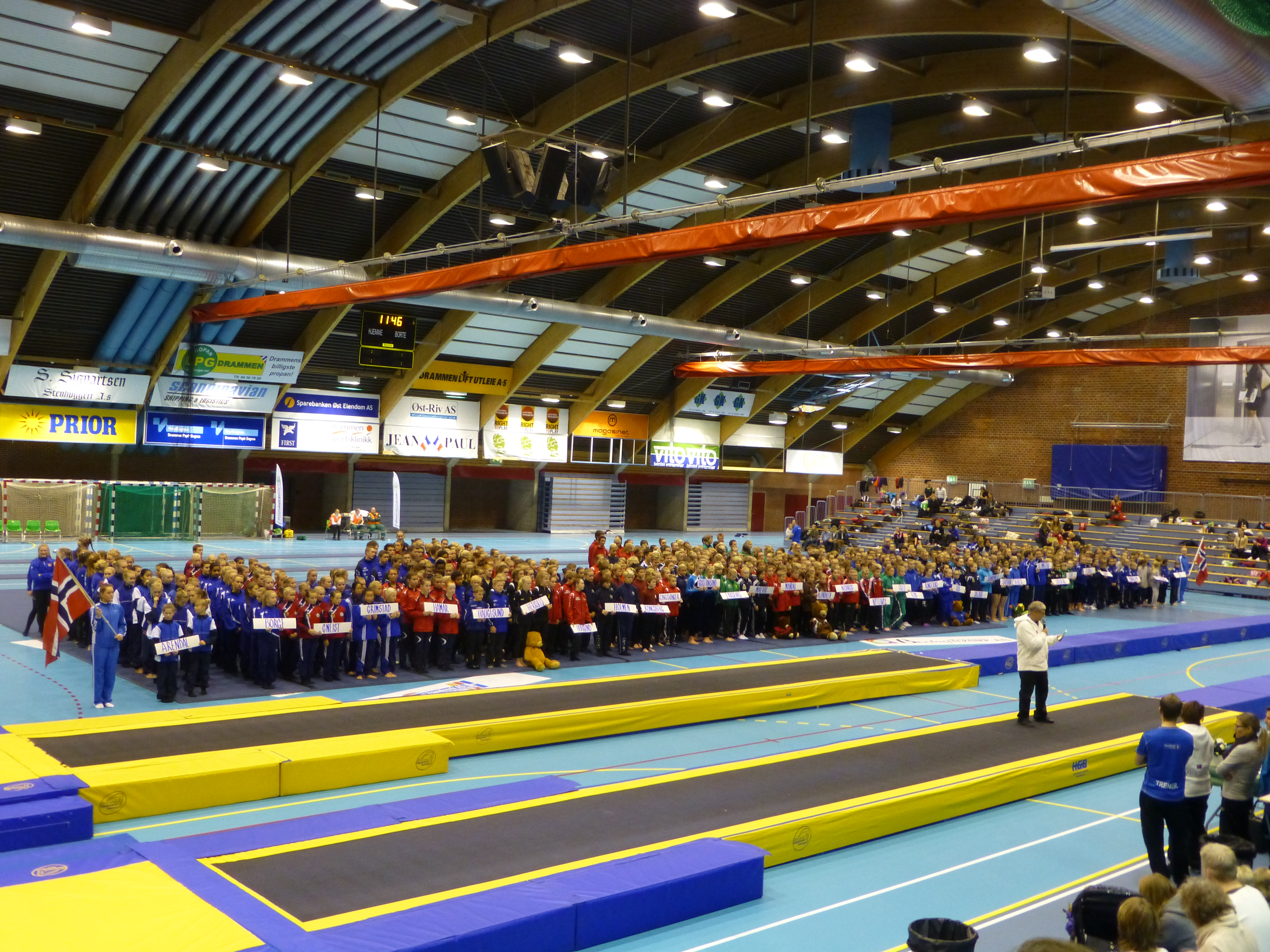 Buskerudtrampetten 2012 i Drammenshallen, Drammen.